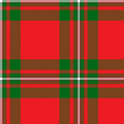 W/8 K2 G12 R12 G36 R/132